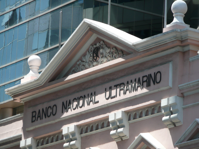 Banco Nacional Ultramarino building in Macau.